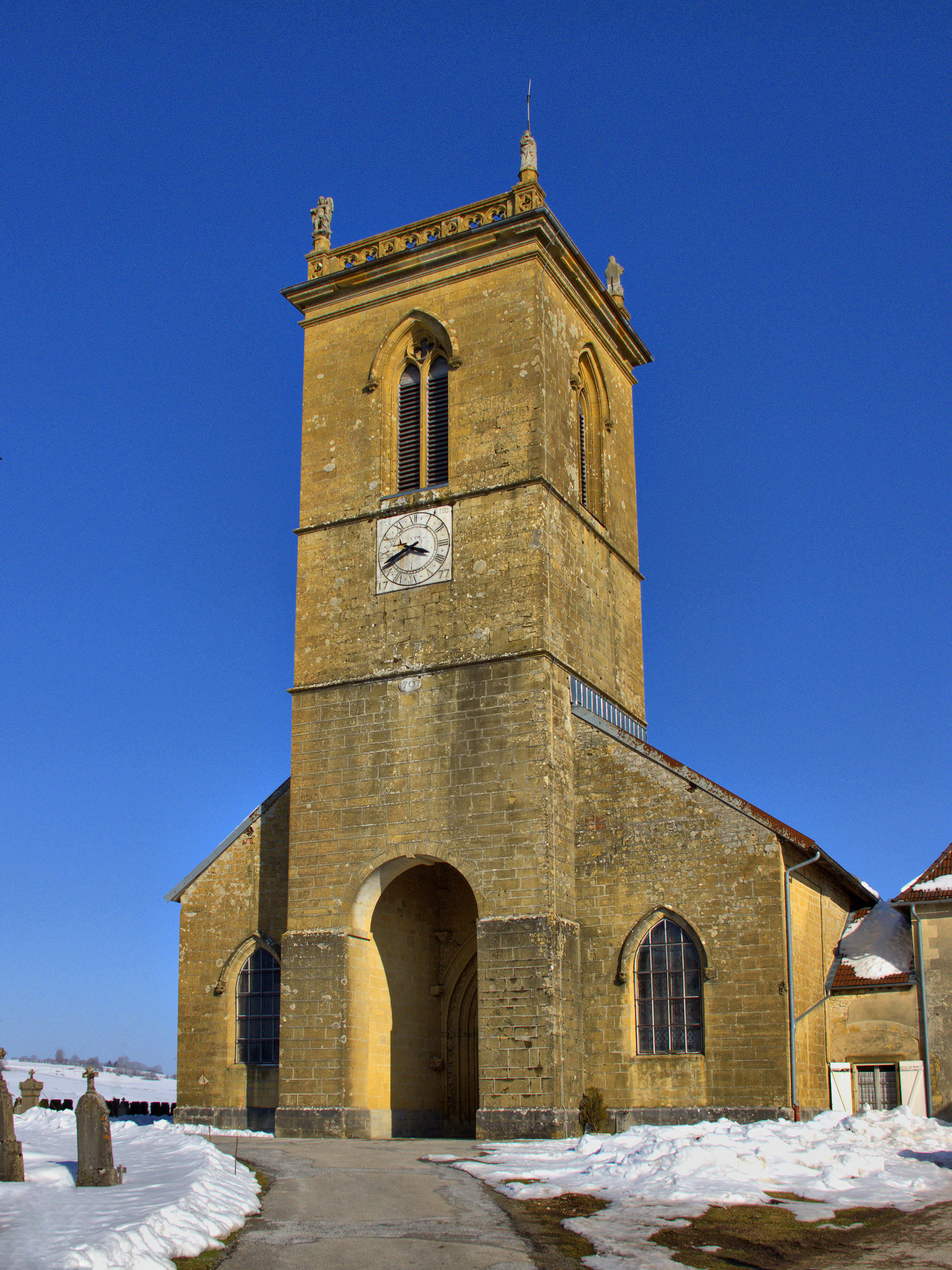 Inscrit aux monuments historiques sous le numéro PA00101951